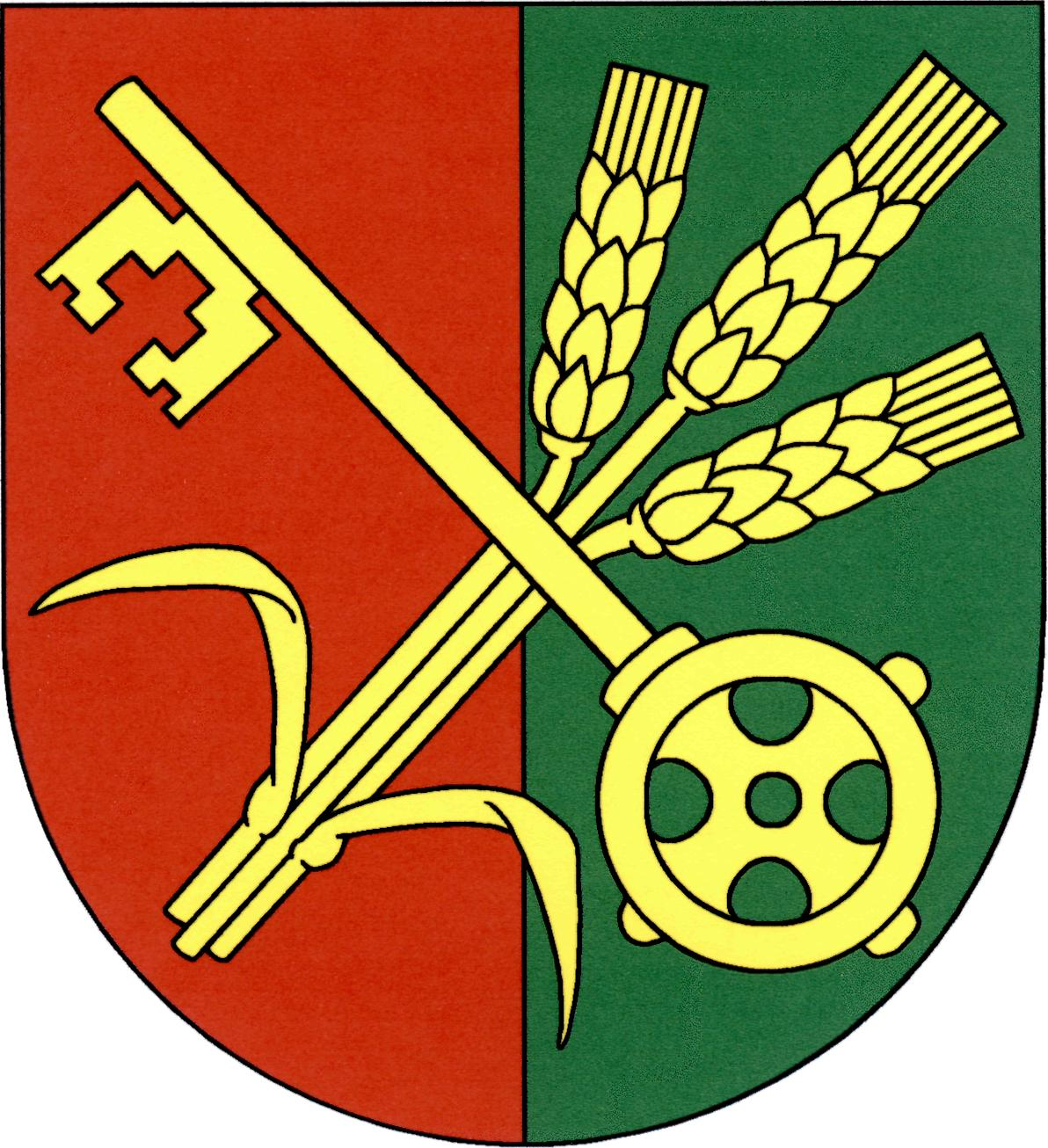 Znak obce Blažejovice